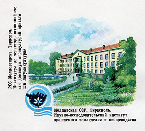 Молдавская ССР. Тирасполь. НИИ орошаемого земледелия и овощеводства